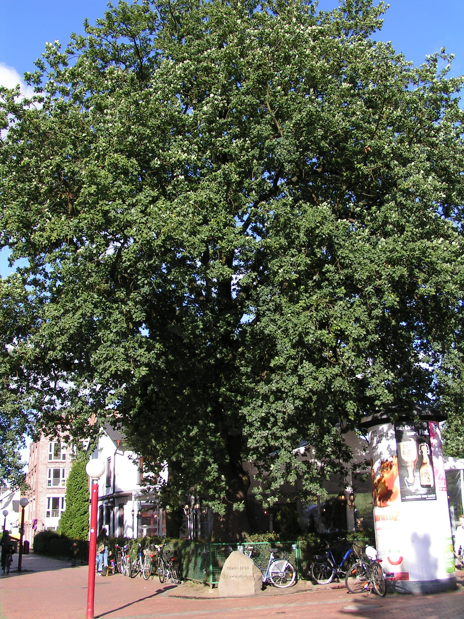 Doppeleiche am Gedenkstein zur Erinnerung an den Schleswig-Holsteinischen Krieg; Niendorf-Markt (Hamburg) - 2006